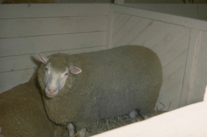 Ile de France